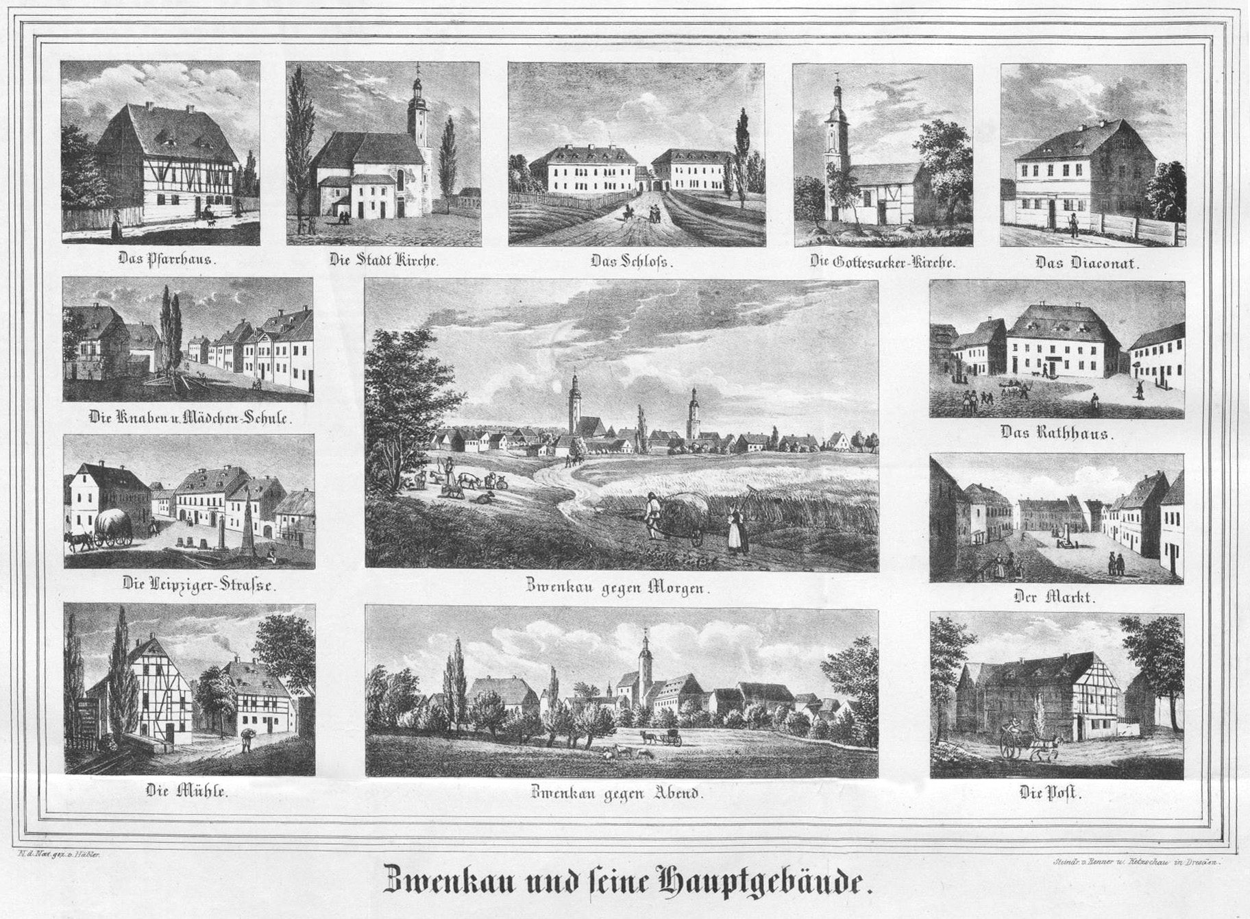 Zwenkau und seine wichtigsten Gebäude um 1840